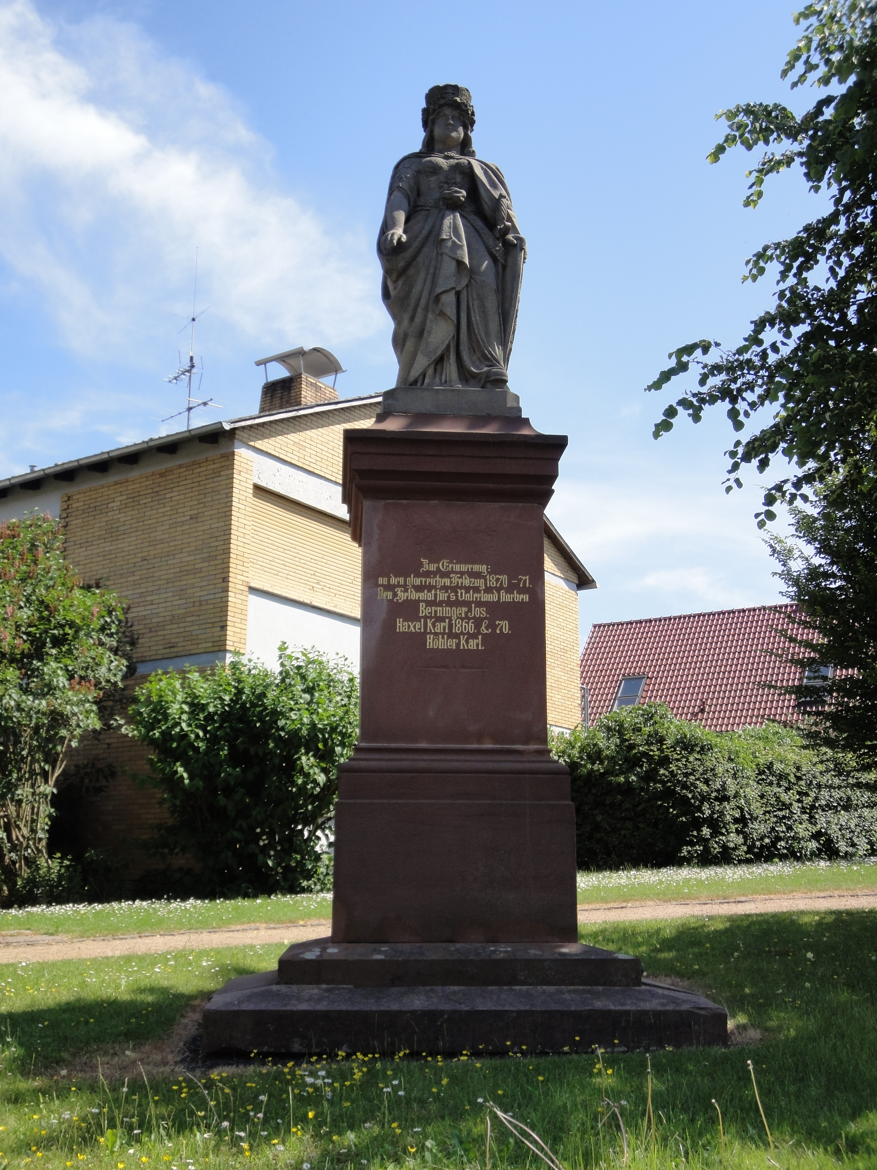 Gefallenendenkmal für den Deutsch-Französischen Krieg in Idstein Wörsdorf